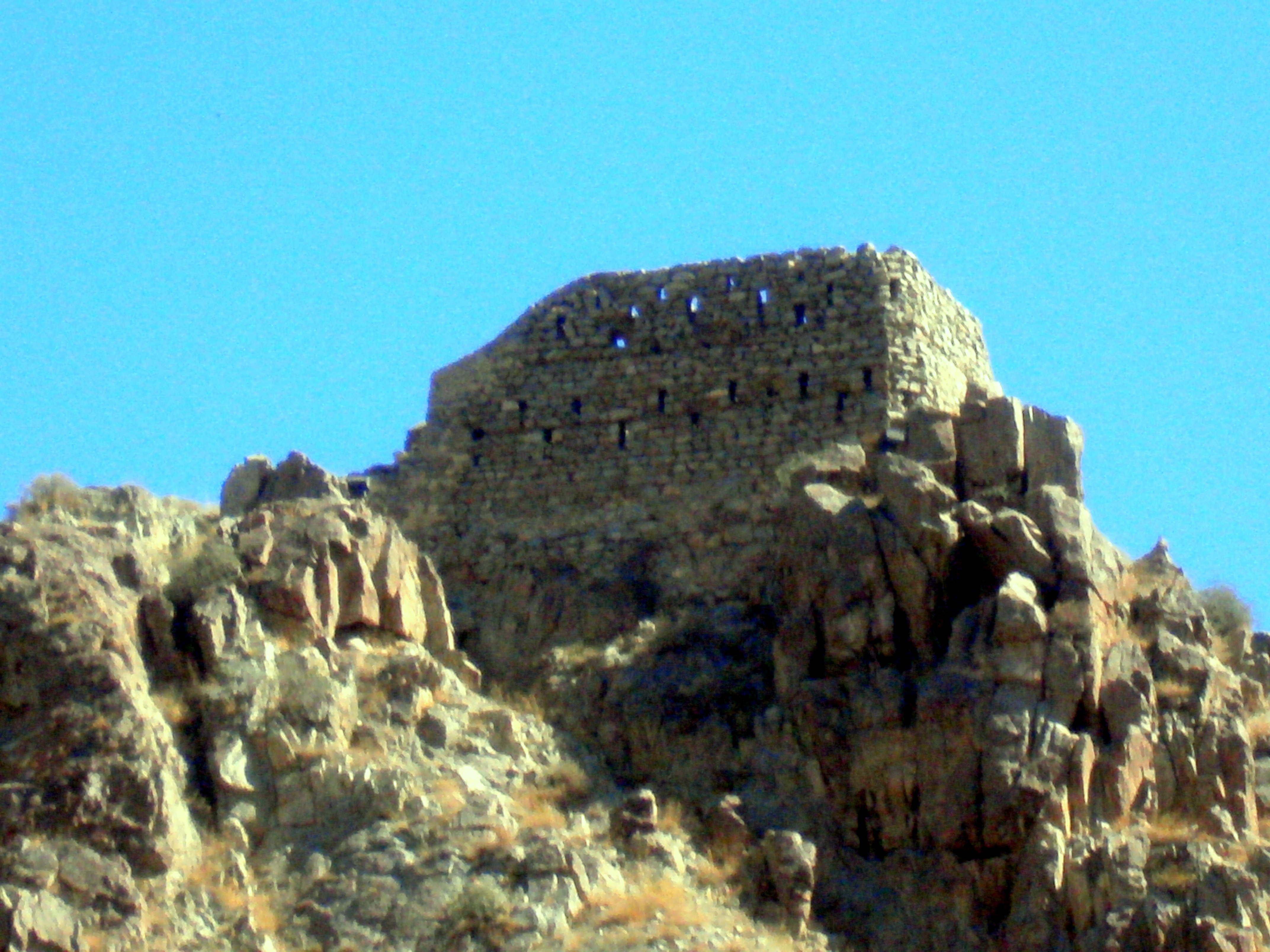 10Դ.վերջ 11դ.սկիզբ 5/1.2